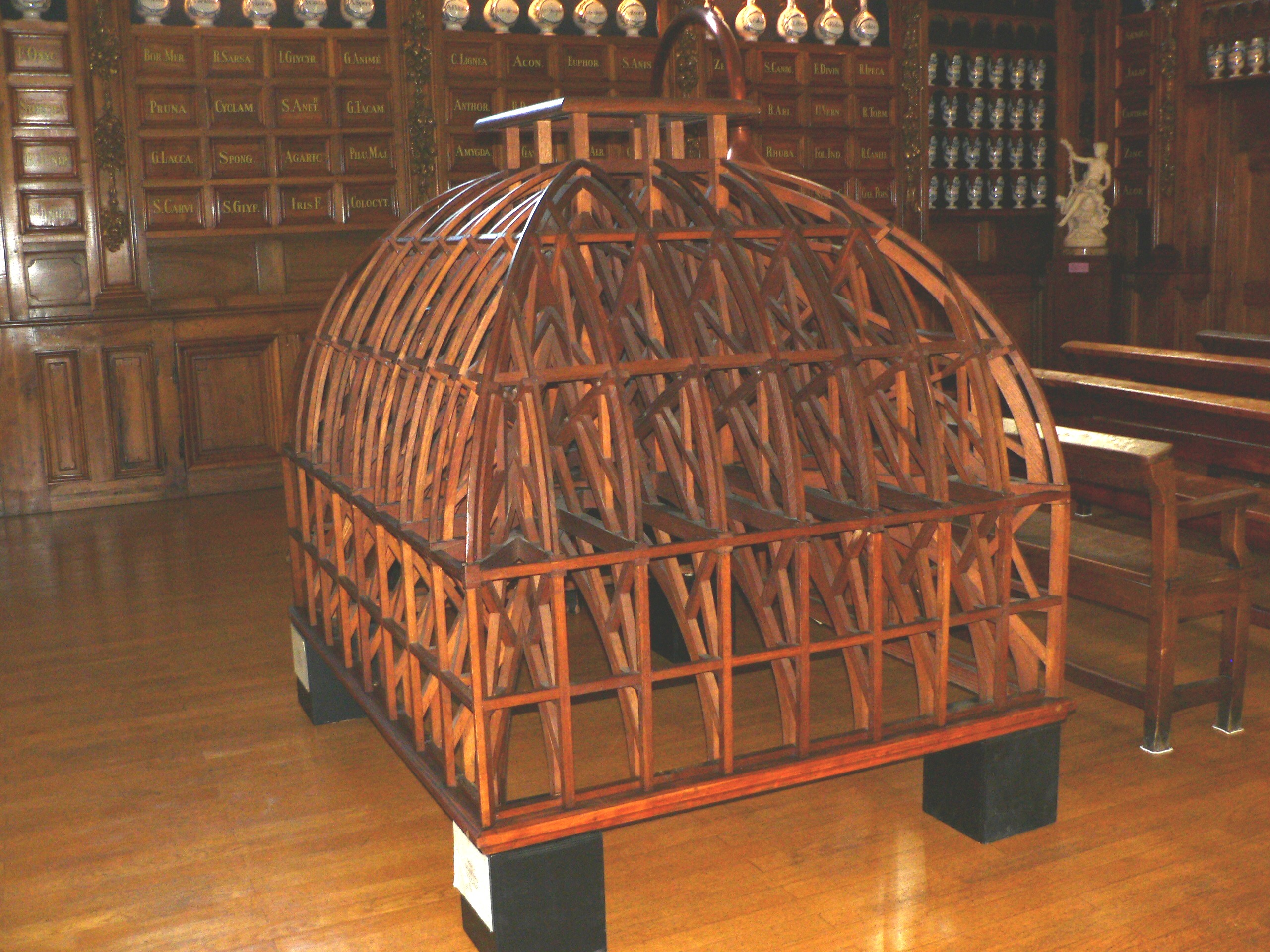 Maquette de la charpente du grand dôme de la façade de l'Hôtel Dieu de Lyon - M. Despierres ; 2007.0.1439.M Architecture d'ébénisterie - maquette de charpente bois, chêne (assemblage par tenons et mortaises) L. 175 cm ; H. 140 cm ; l. 140 cm ; VOLUM. 3,43 entre 1945 et 1950